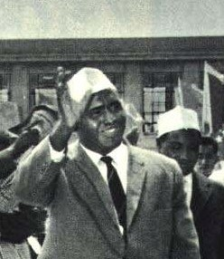 1963-10 1963年 索马里总理阿卜迪拉希德·阿里·舍马克 Abdirashid Ali Shermarke